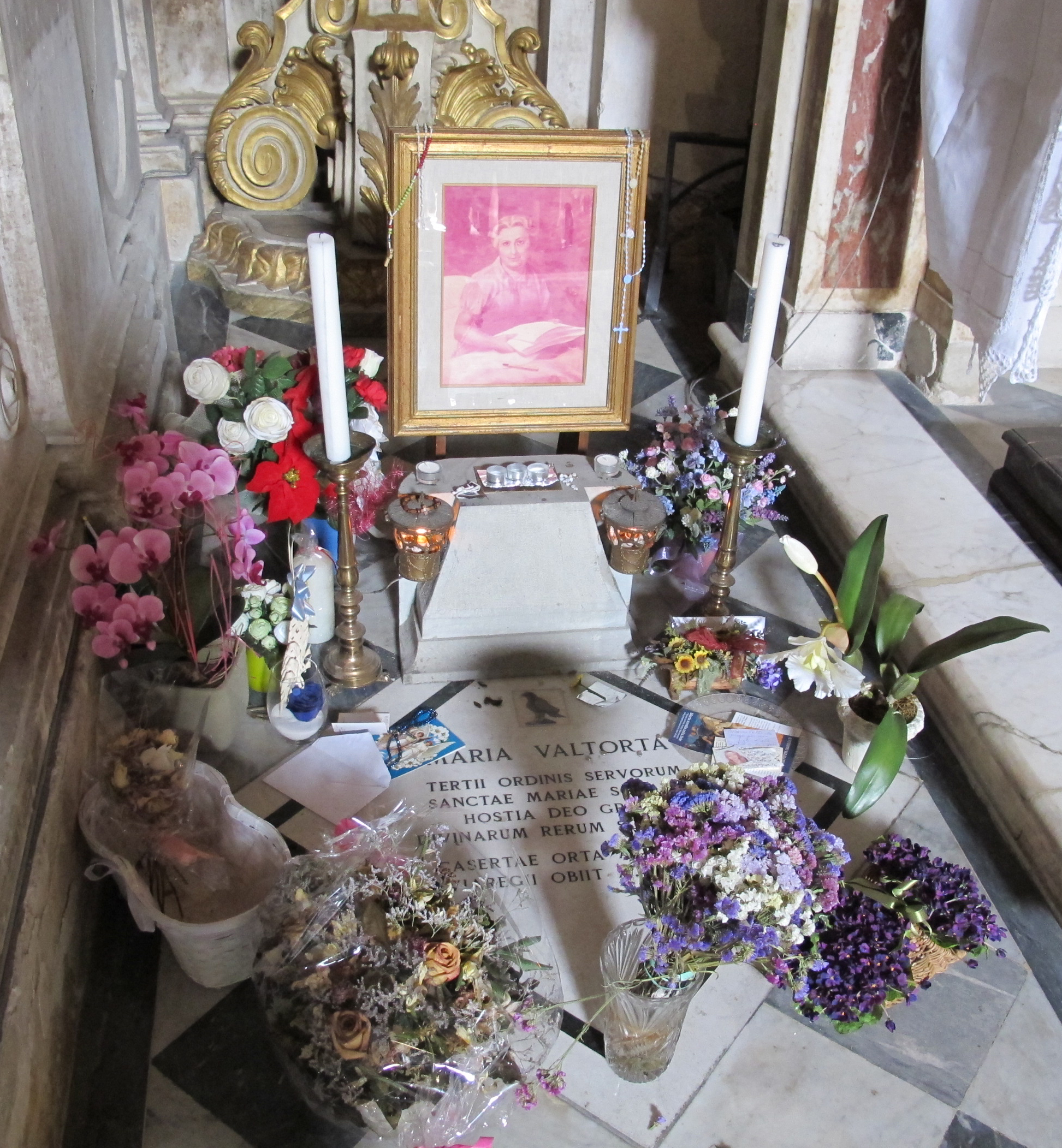 Capitolo della ss. annunziata, 13 tomba maria valtorta